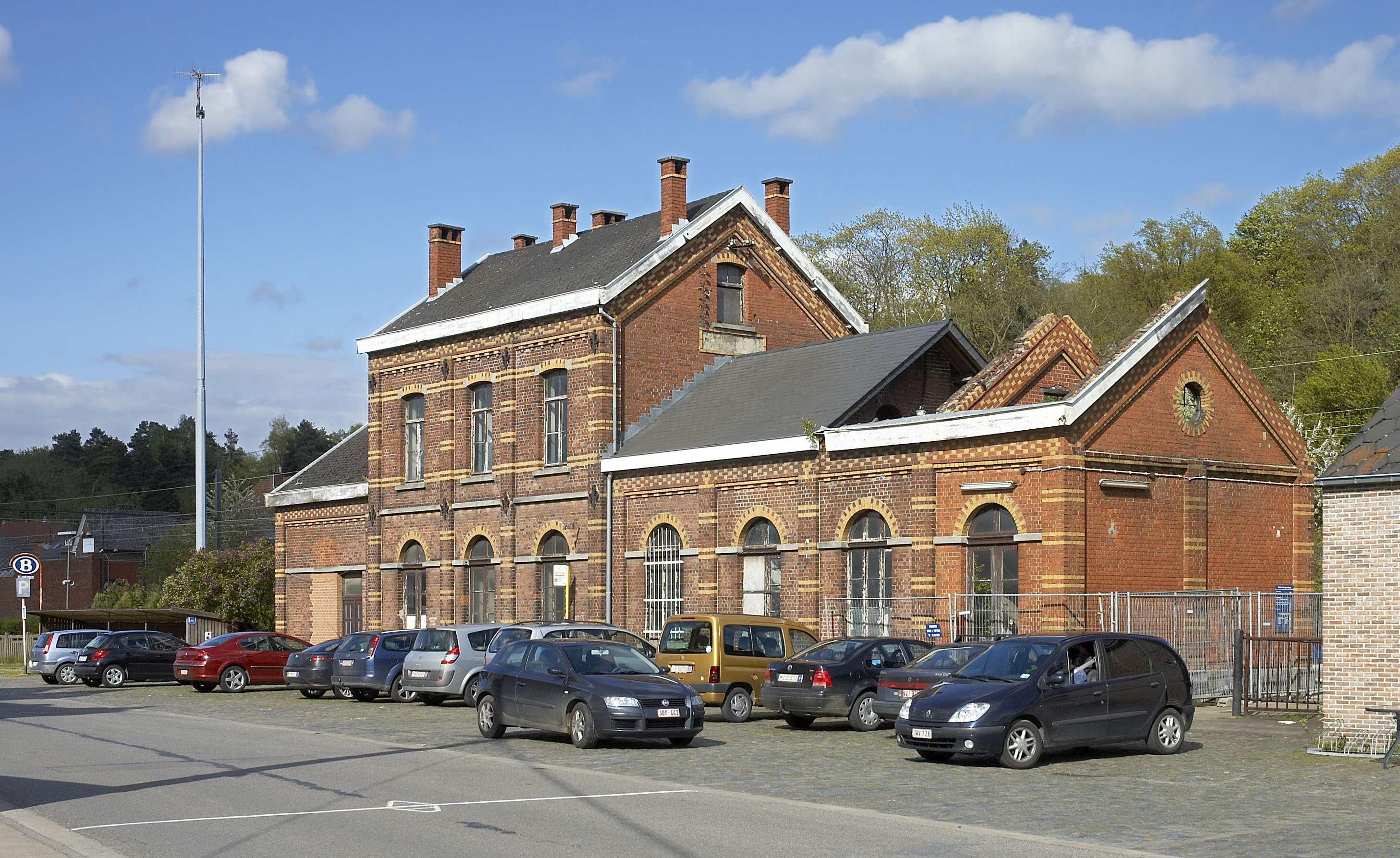 Train station in Sint-Joris-Weert (Oud-Heverlee), Belgium.